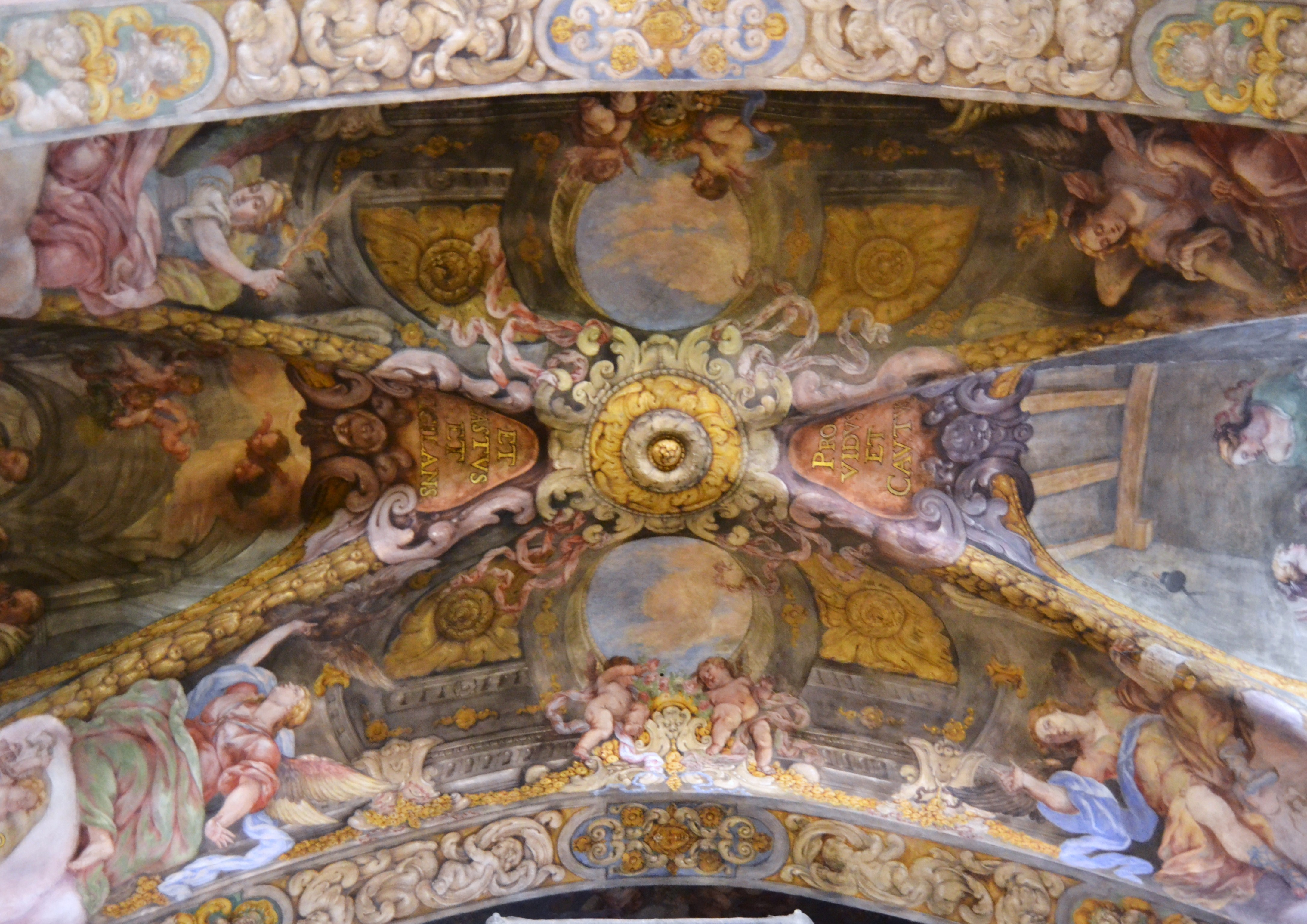 Església de sant Nicolau de València, volta amb frescos.